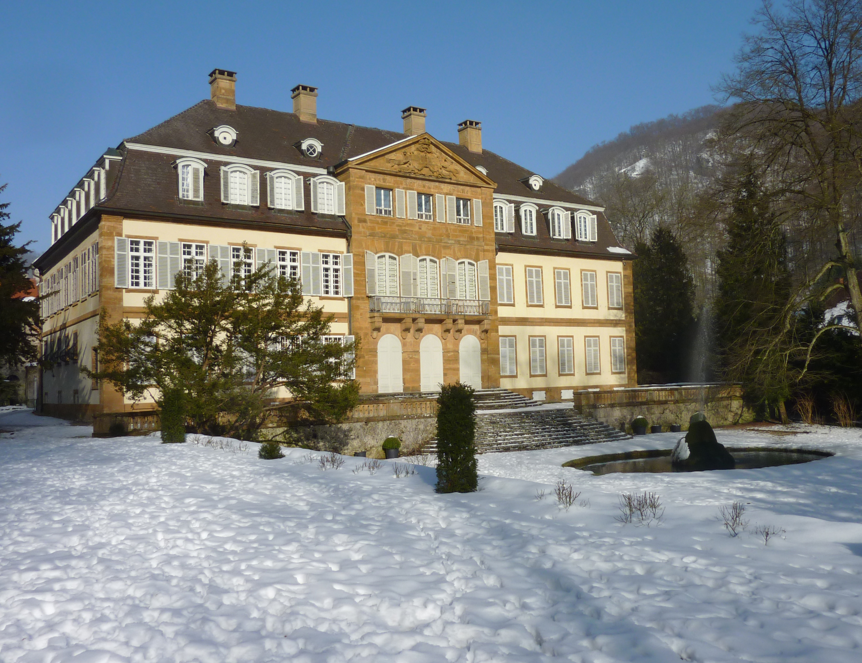 Schauseite von Schloss Eybach vom Park aus.